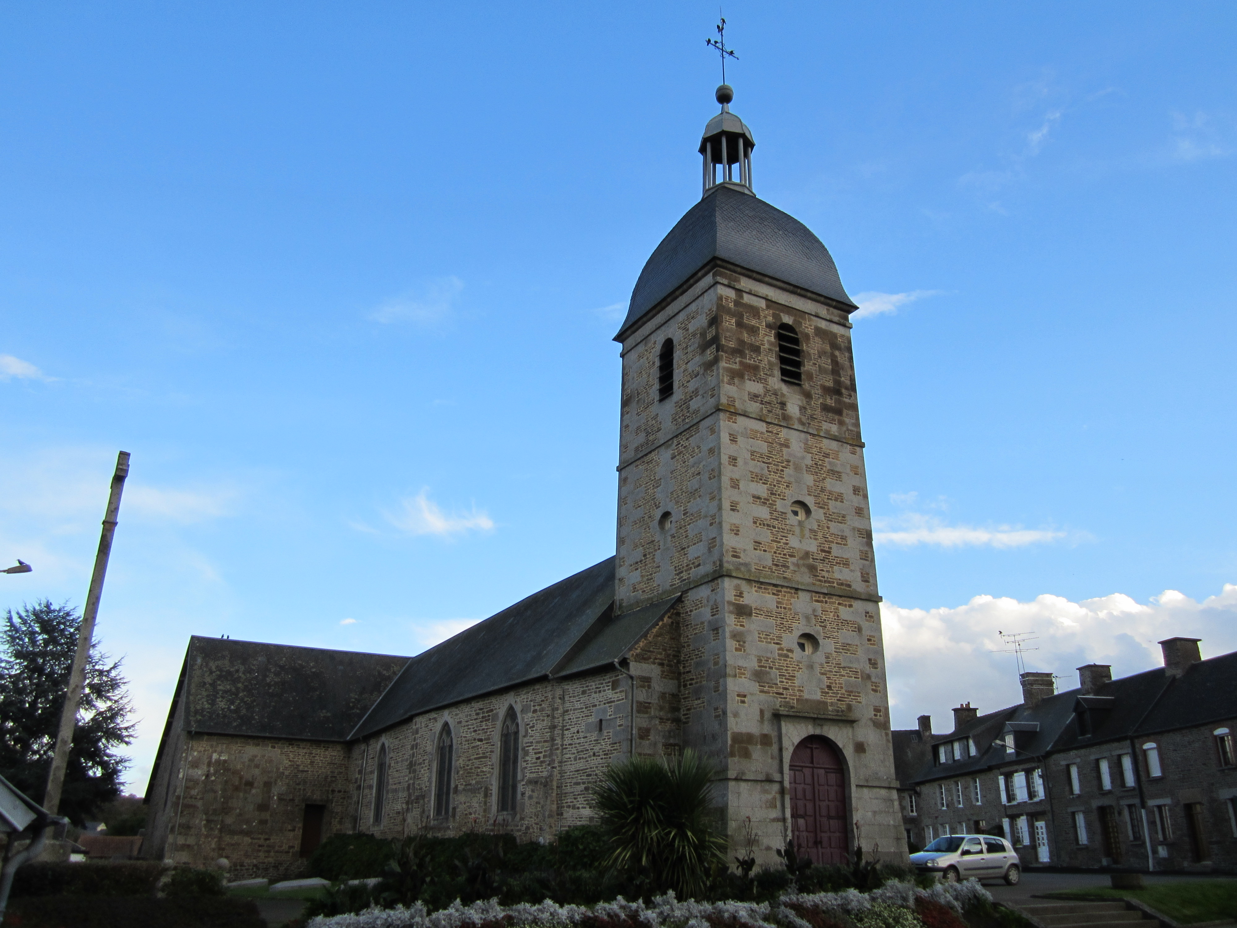 église Saint-Aubin de Saint-Aubin-de-Terregatte